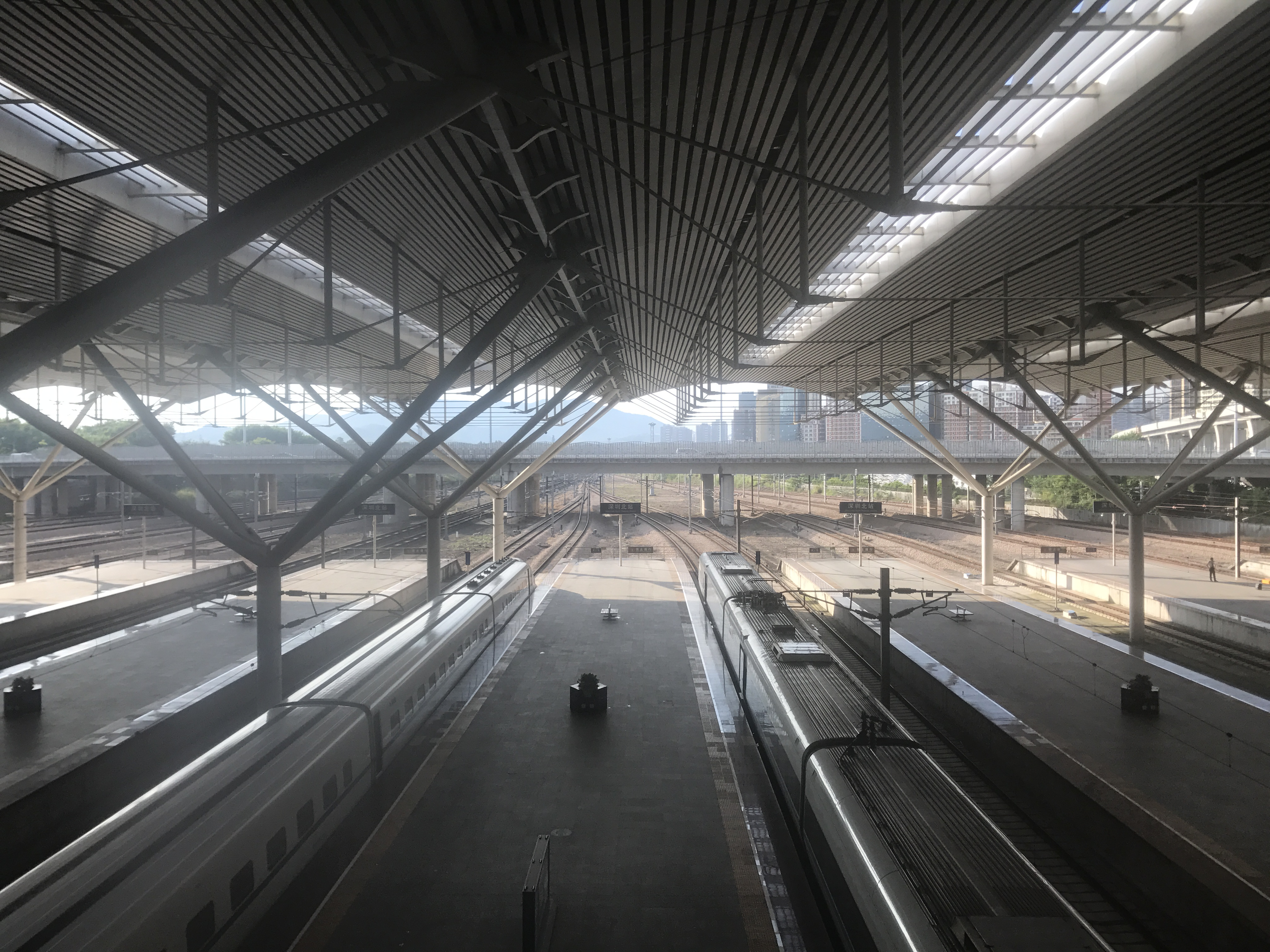 深圳北駅の跨線橋より望むホーム